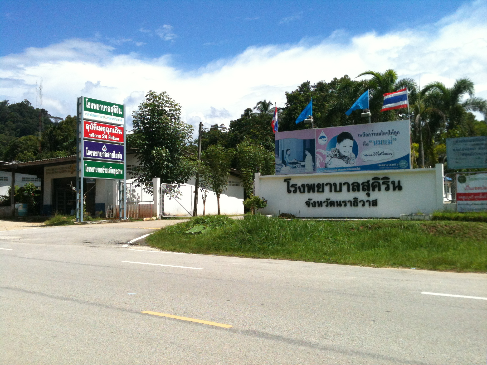 โรงพยาบาลสุคิริน